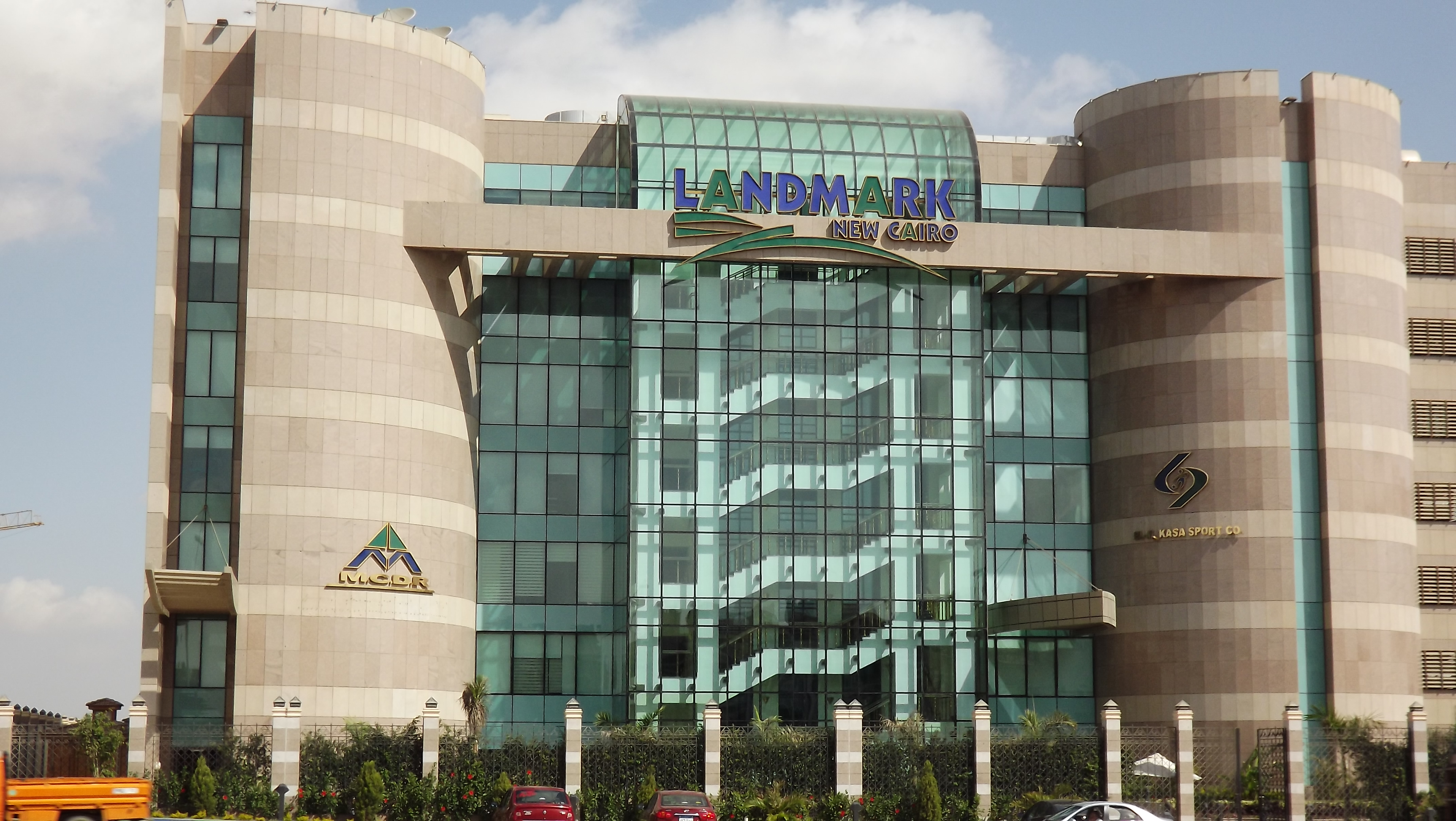 مصر للمقاصة مبنى التجمع الخامس 1